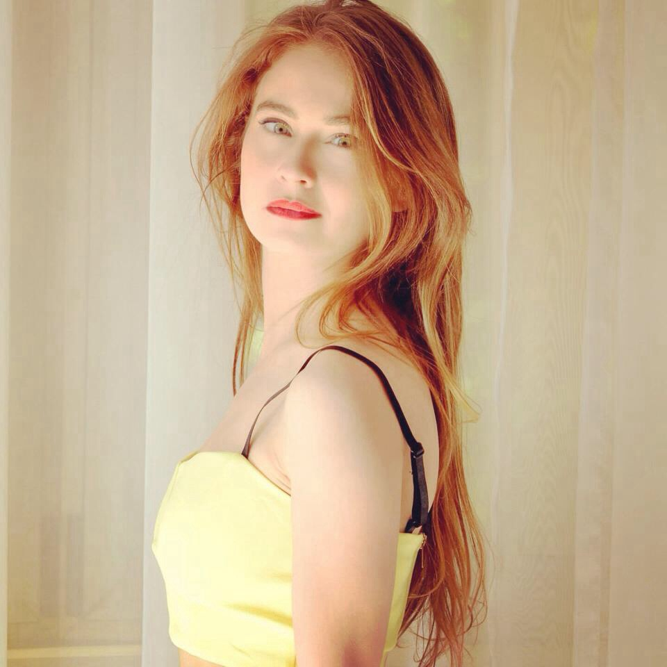 לוסי דובינצ'יק